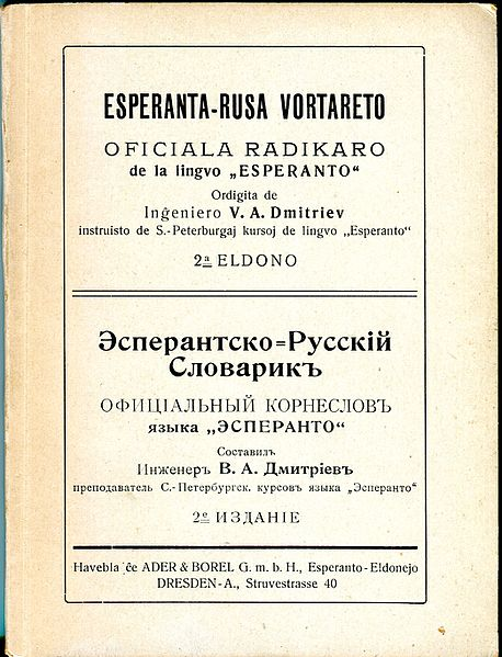 Esperanta-Rusa Vortareto, V.A. Dmitriev, 1920 (2-a eldono)